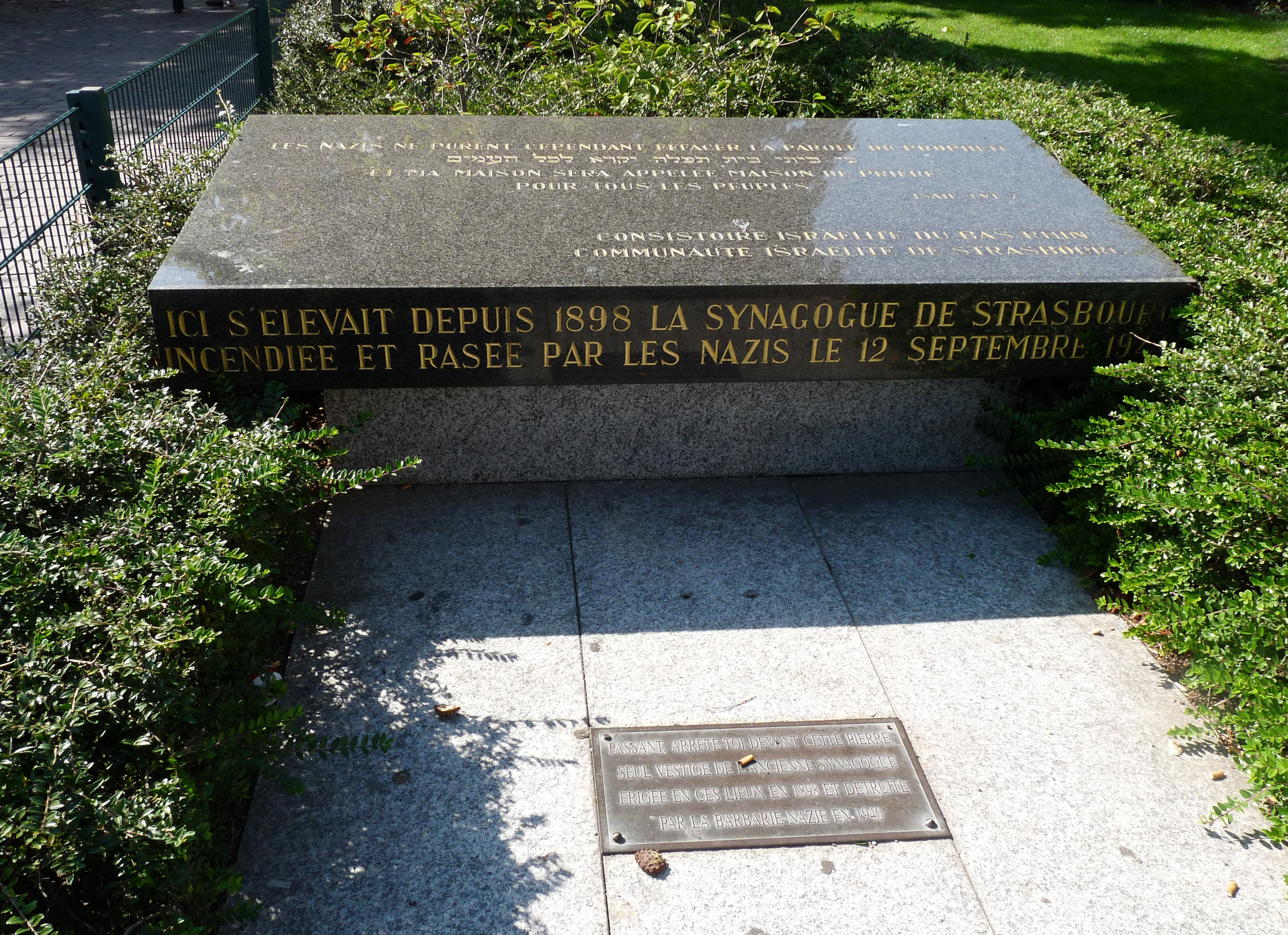 Dalle commémorant la destruction par les nazis de l'ancienne synagogue construite en 1898 (Place des Halles, Strasbourg).